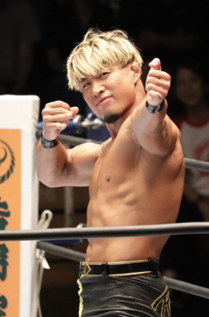 SHO 2018.7.21